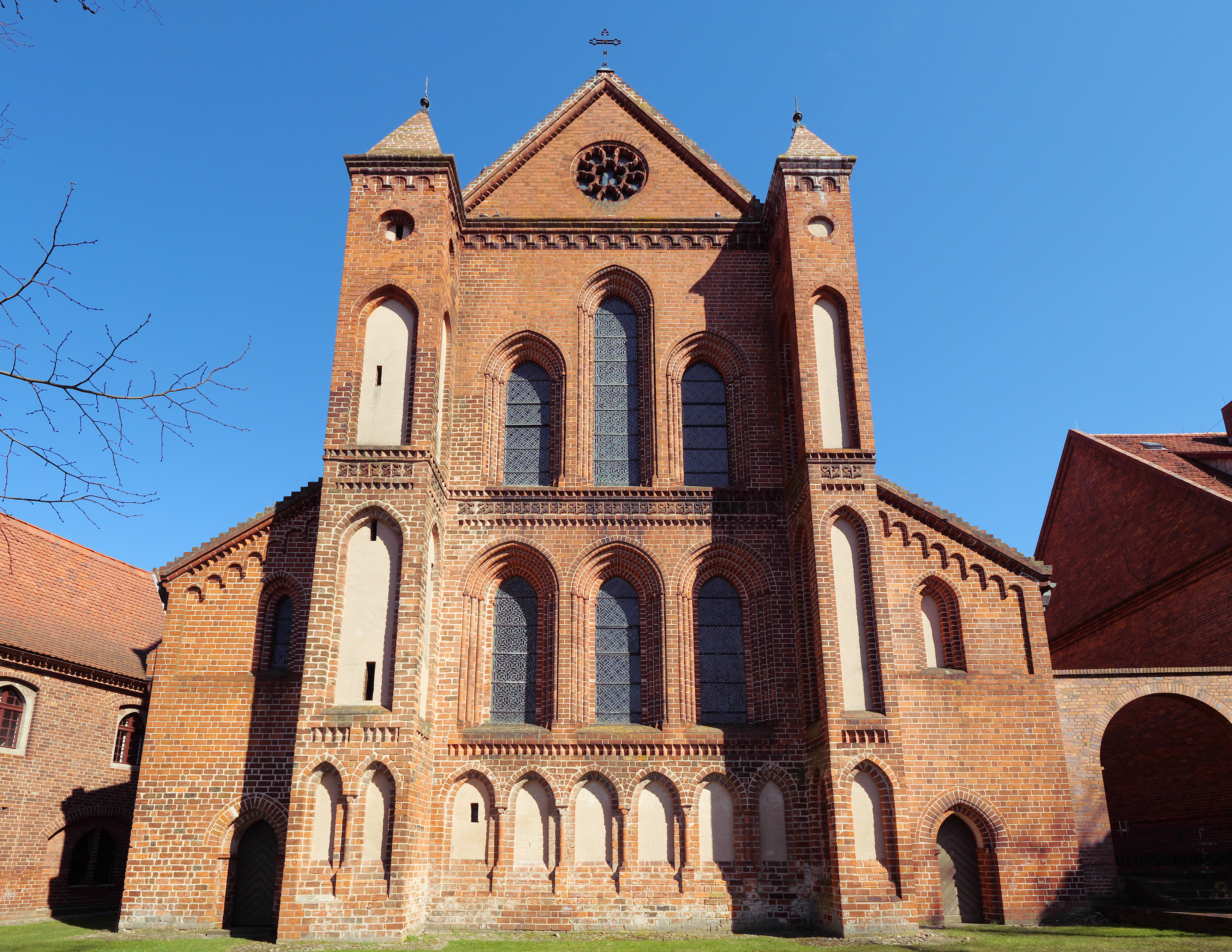 Westfassade des Klosters Lehnin in Brandenburg / Deutschland